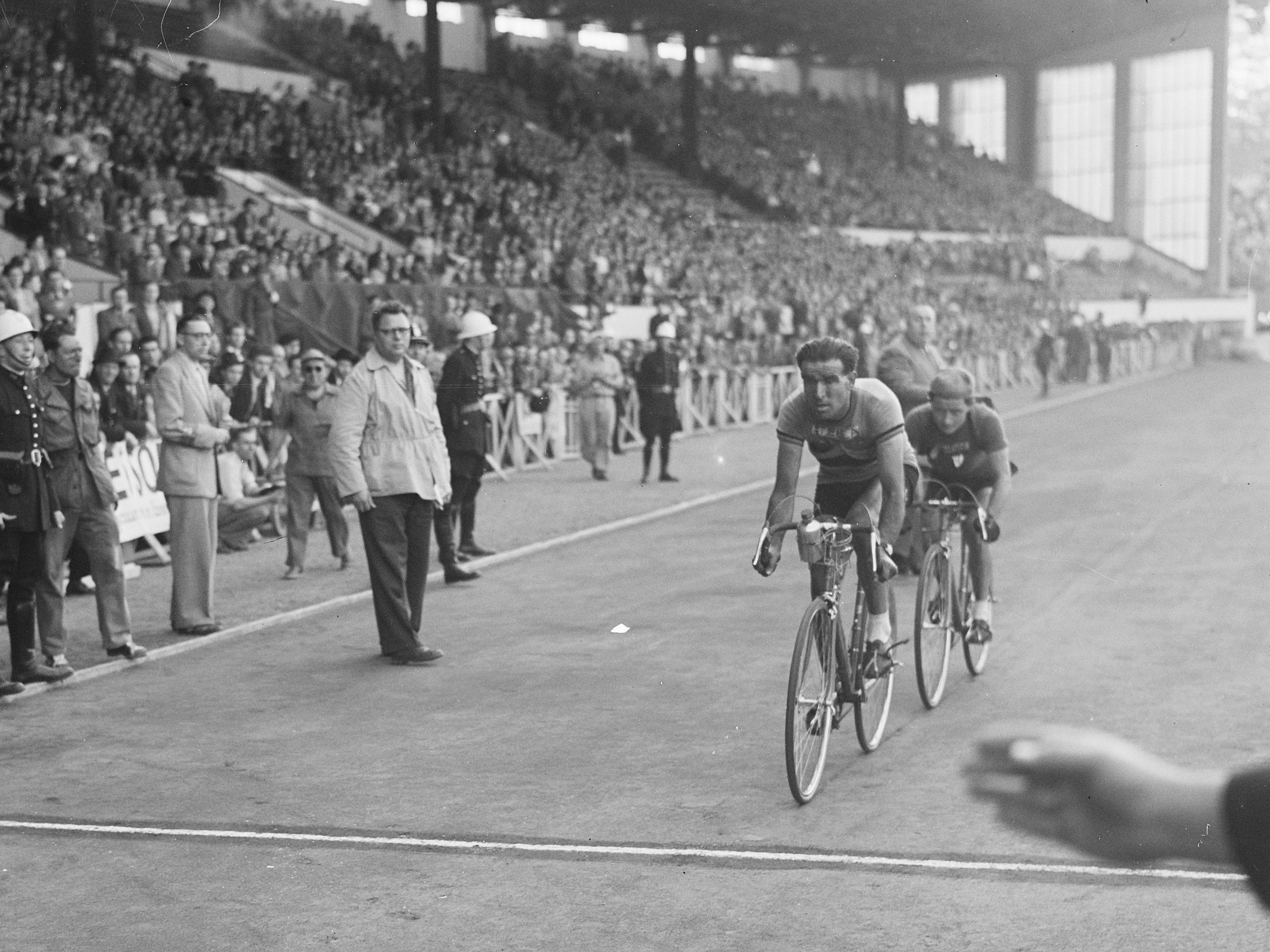 Tour de France, 2e etappe Reims-Brussel. Finish, Roger Lambrecht (België) en Jacques Marinelli (Frankrijk)